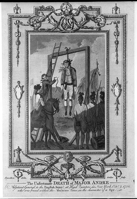 John André hanged